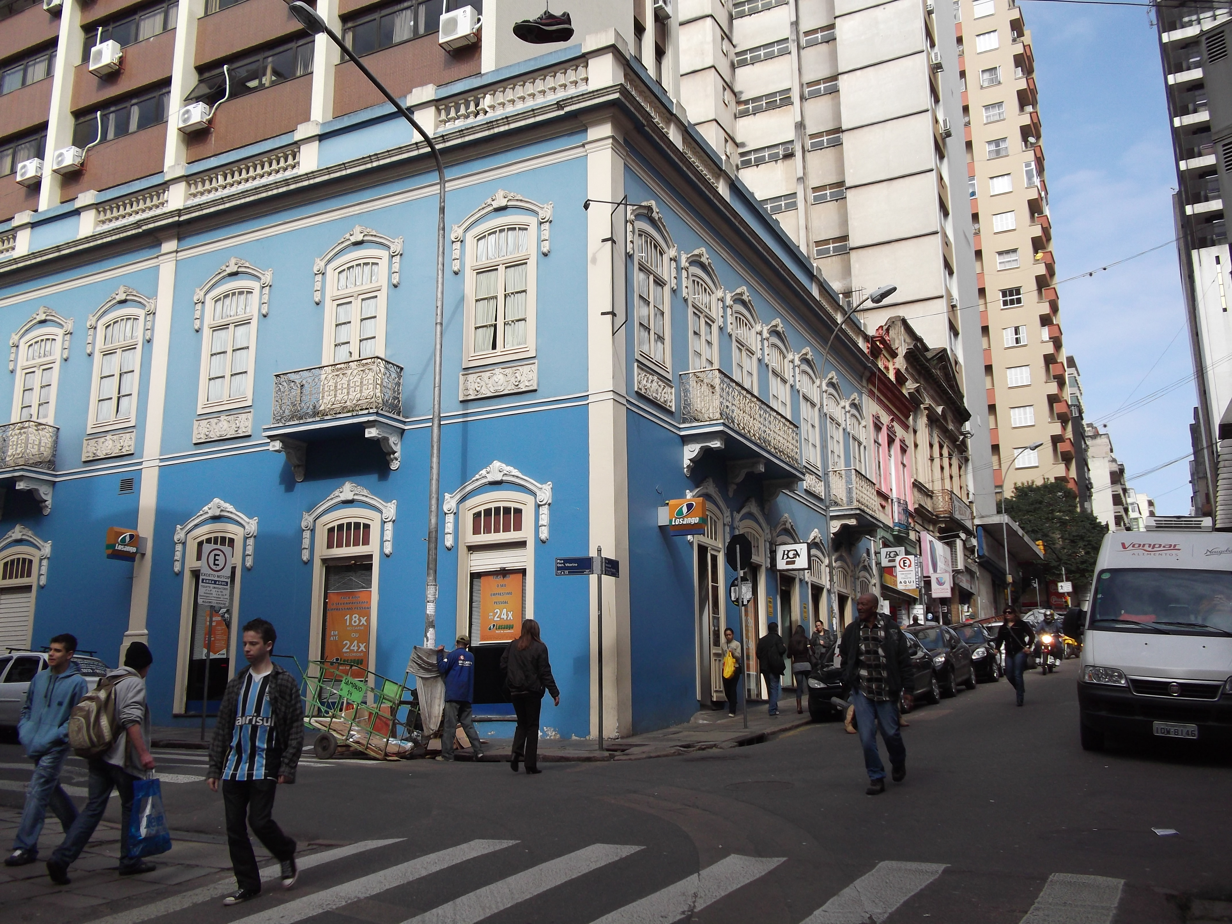 Rua Gal vitorino com Rua Mal Floriano Peixoto